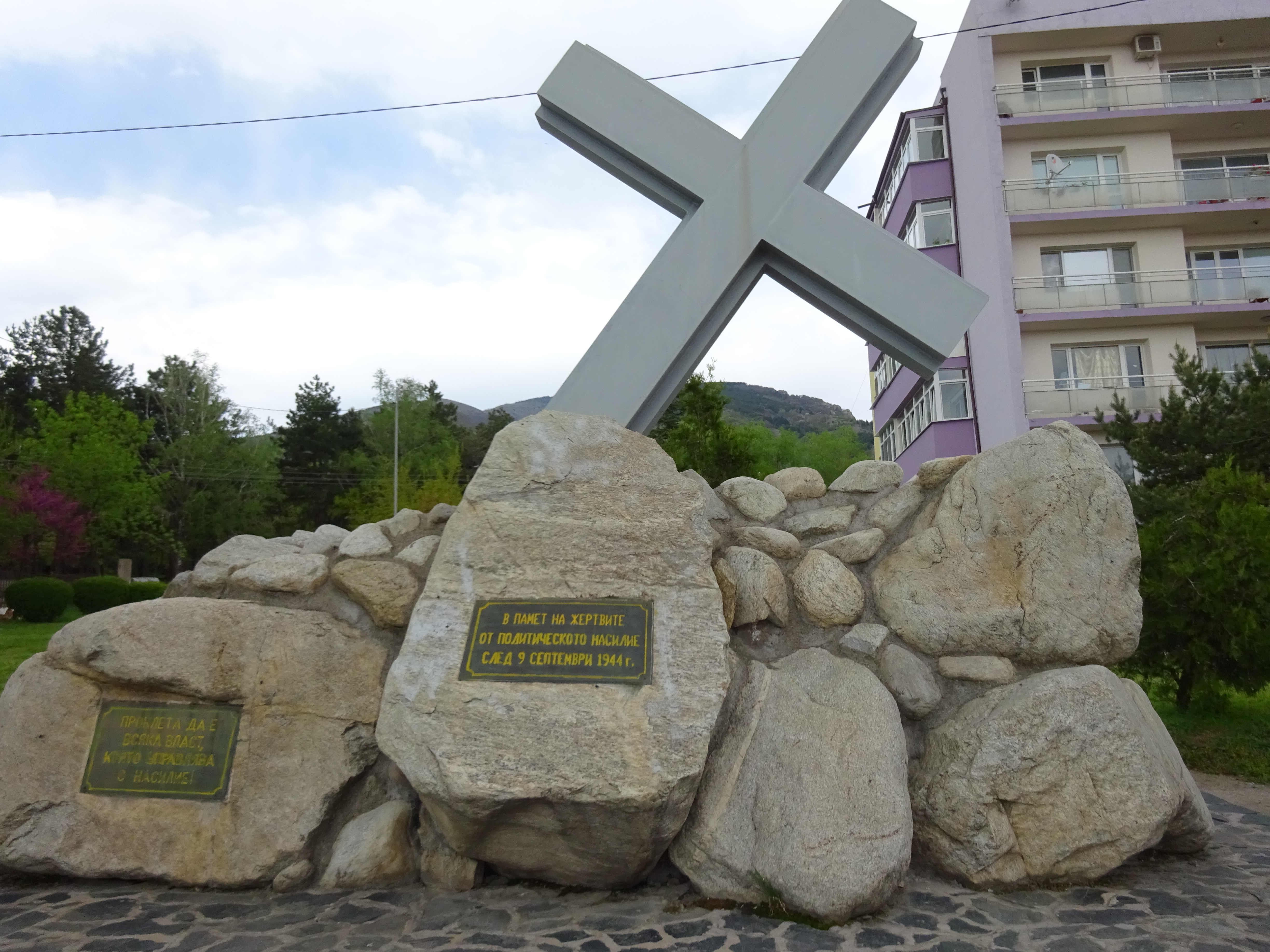 Паметник на жертвите след 9 септември 1944, Карлово